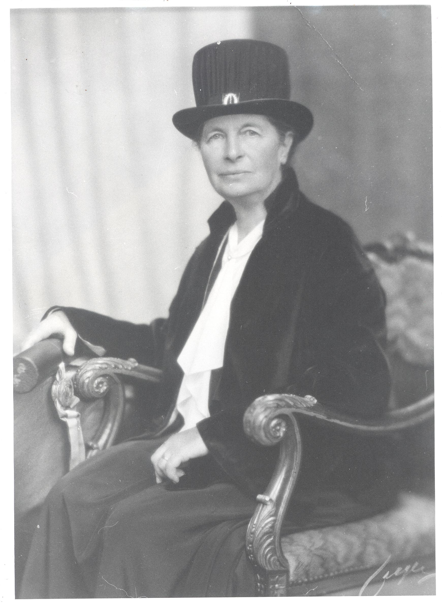 Sveriges första kvinnliga läkare, Karolina Widerström.